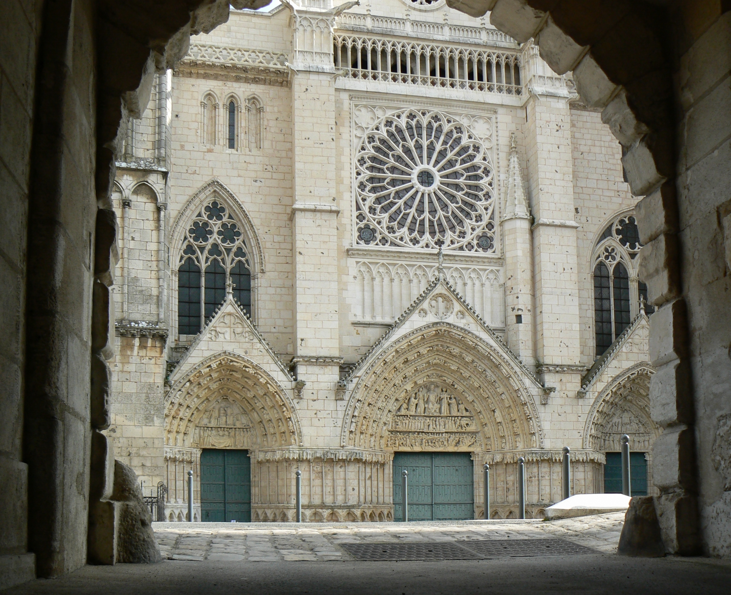 Poitiers: Cathédrale Saint Pierre: Façade (ouest) de la cathédrale